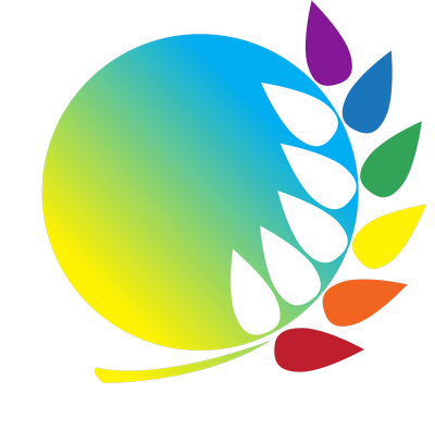 Емблема VII Національної конференції ЛГБТ-руху і ЧСЧ-сервісу України, 2014